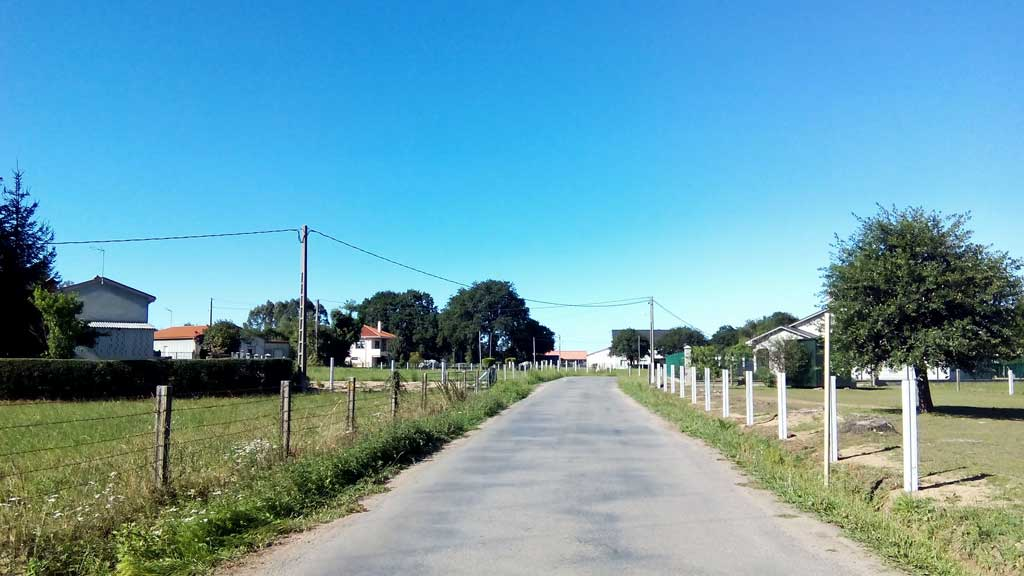 Vista dos Carballás, Curtis.